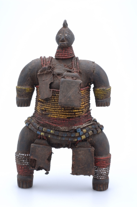 De vruchtbaarheidspop wordt door onvruchtbare vrouwen op de buik gedragen om zo zwanger te worden (Lefèber 1994: 24). Wente-Lukas (1977) vermeld dat de Doyayo vrouwen en meisjes een dergelijke pop als een baby in een vel op de rug dragen ter bevordering van hun vruchtbaarheid. Vaak zijn de poppen niet alleen met kralen maar ook met oude lapjes, kaurischelpen en soms ook echte haren versierd. Zo'n pop is het verplichte geschenk van een jongeman aan zijn verloofde en krijgt het geslacht dat het paar zich wenst als toekomstig kind.